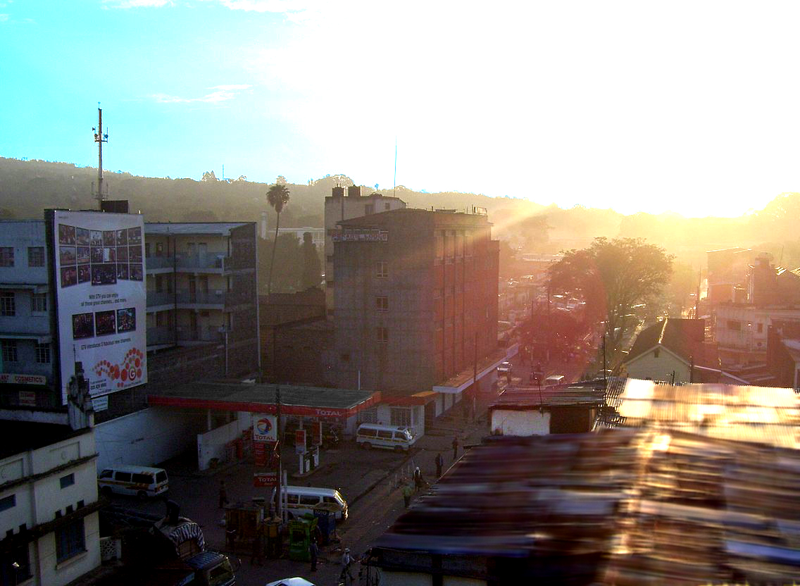 Sunrise in Nakuru Station